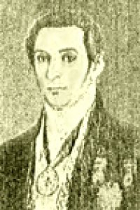 Historiador e poeta brasileiro.